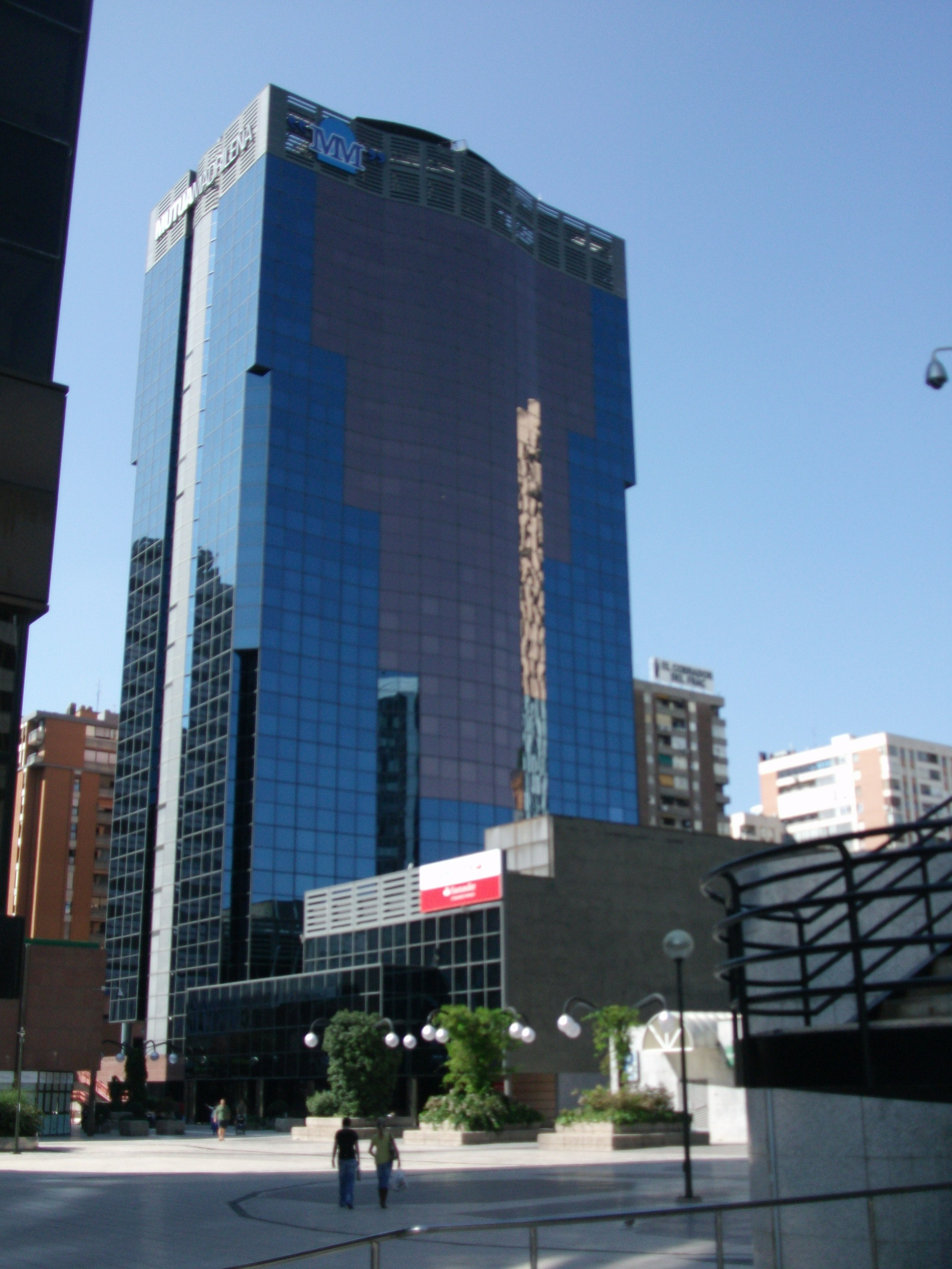 Complejo Azca